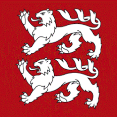 Flag of Zuzwil, Canton of St. Gallen - Flago de Zuzwil, Kantono de Sankt-Galo